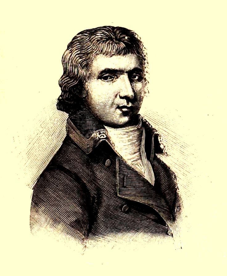 Portrait de Pierre-Charles-Louis Baudin, dit Baudin des Ardennes